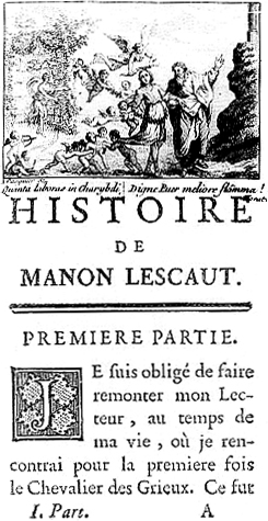 First page of Abbé Prévost's Histoire du Chevalier Des Grieux et de Manon Lescaut